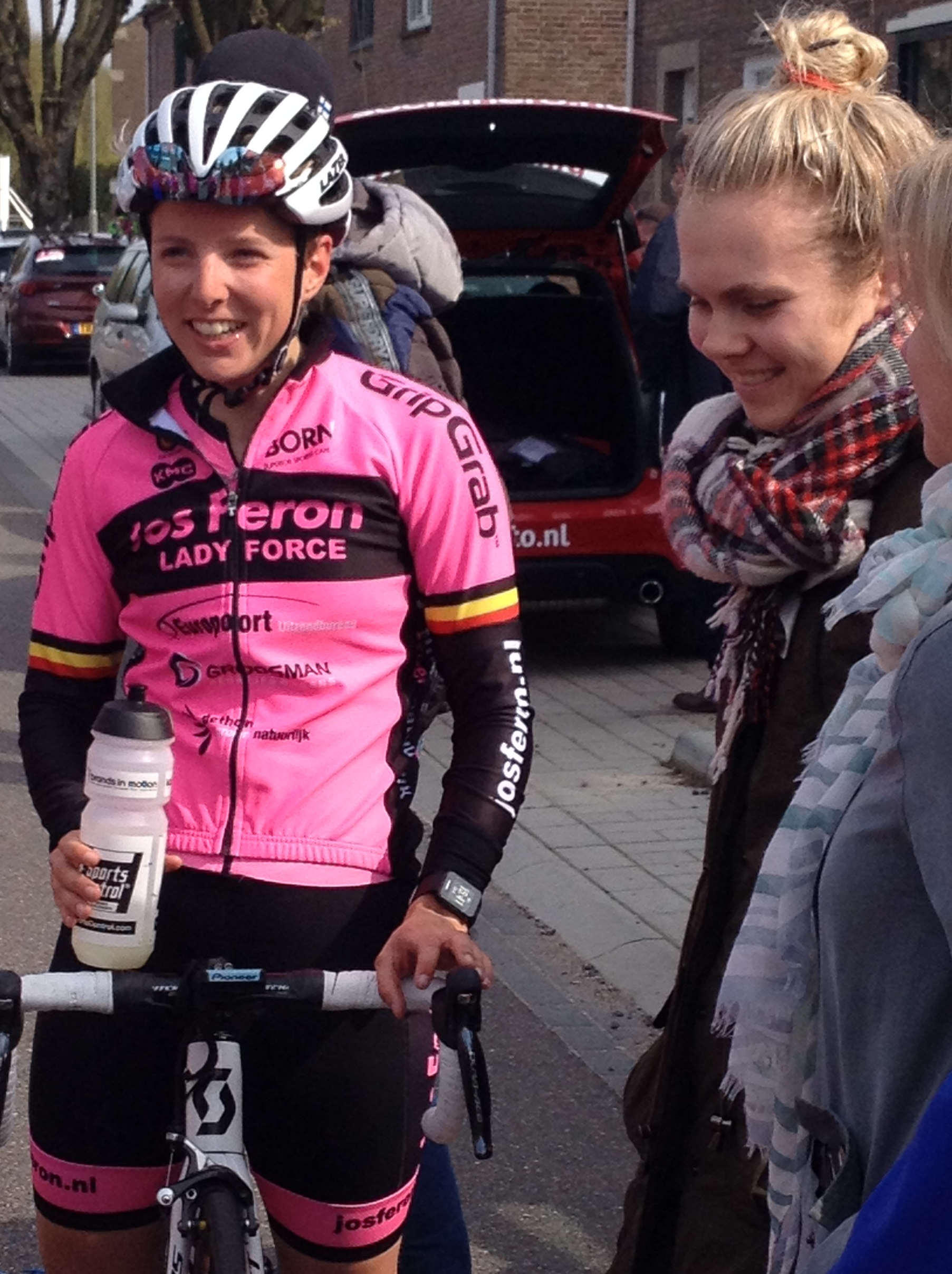 Volta Limburg Classic 2019 voor vrouwen met start en finish in Eijsden, Limburg, Nederland